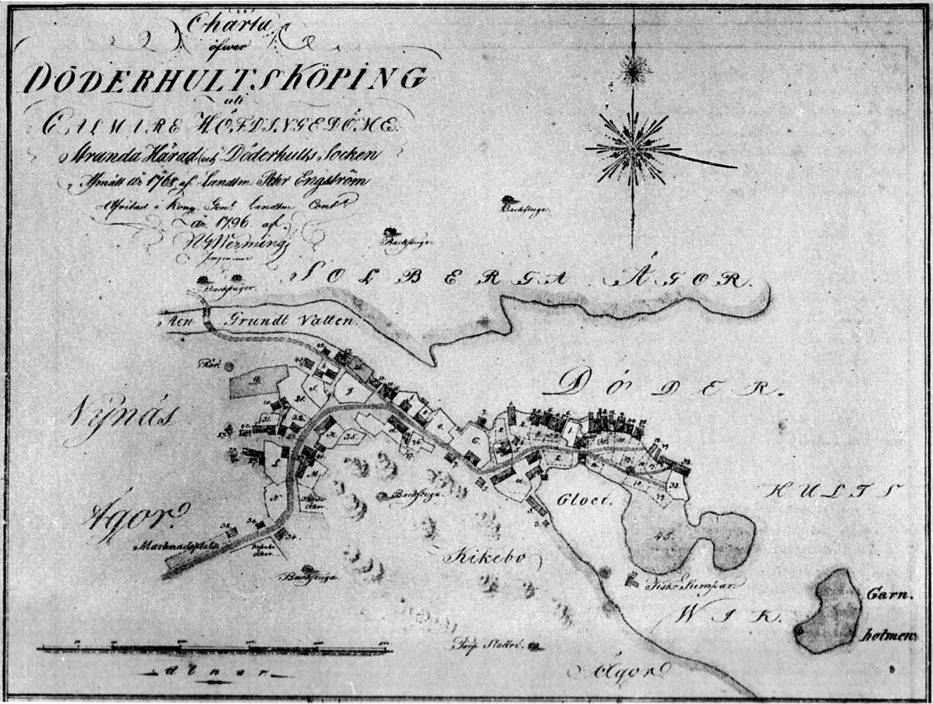 Karta över Döderhultsvik. Uppmätt 1768.